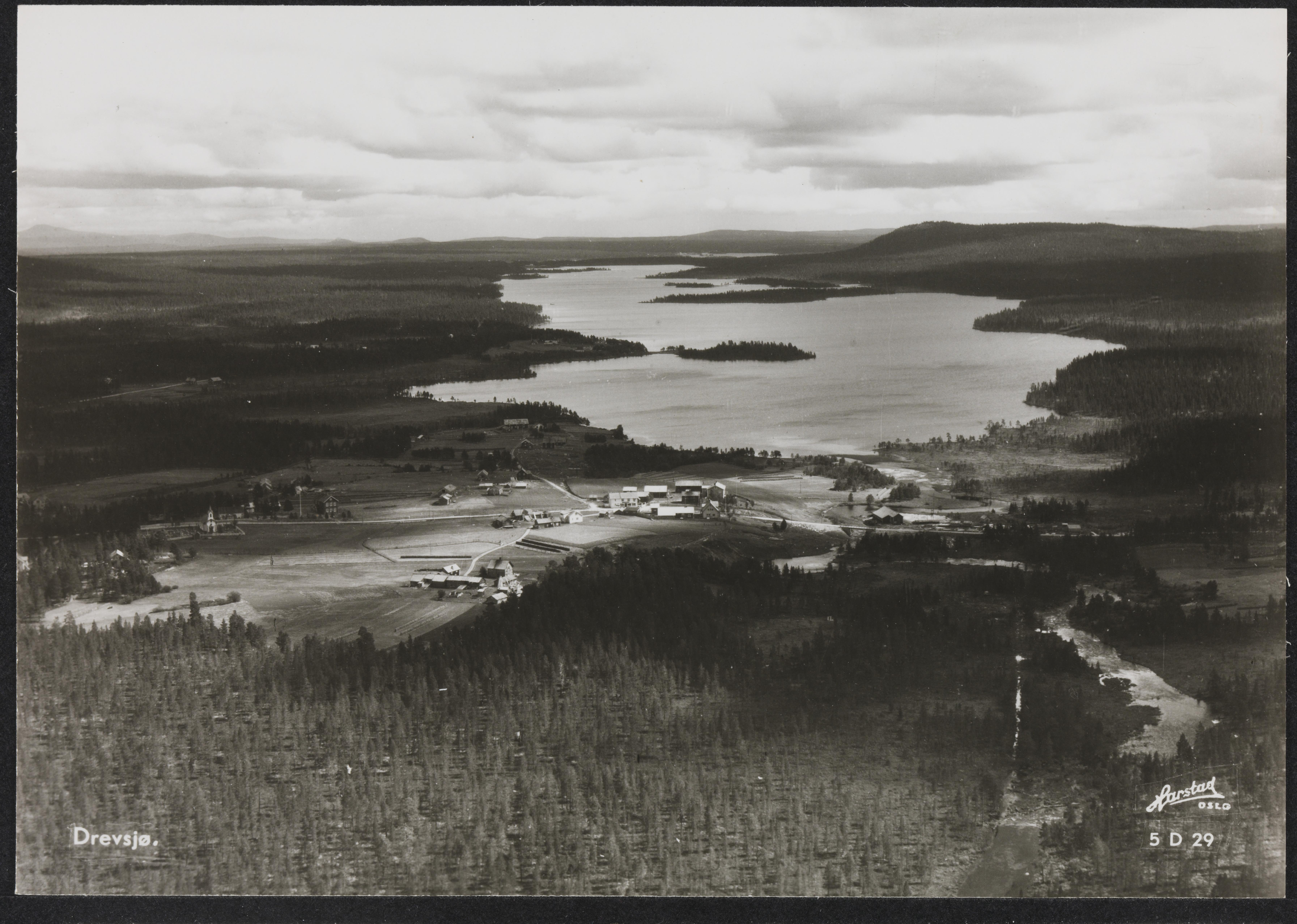 Bildet er hentet fra Nasjonalbibliotekets bildesamling Drevsjø, Engerdal, Hedmark. Sjøen på bildet er formodentlig Vurrusjøen, øst for tettstedet Drevsjø.